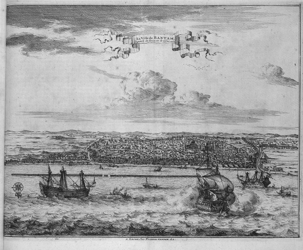 La ville de Banten, sur l’île de Java.